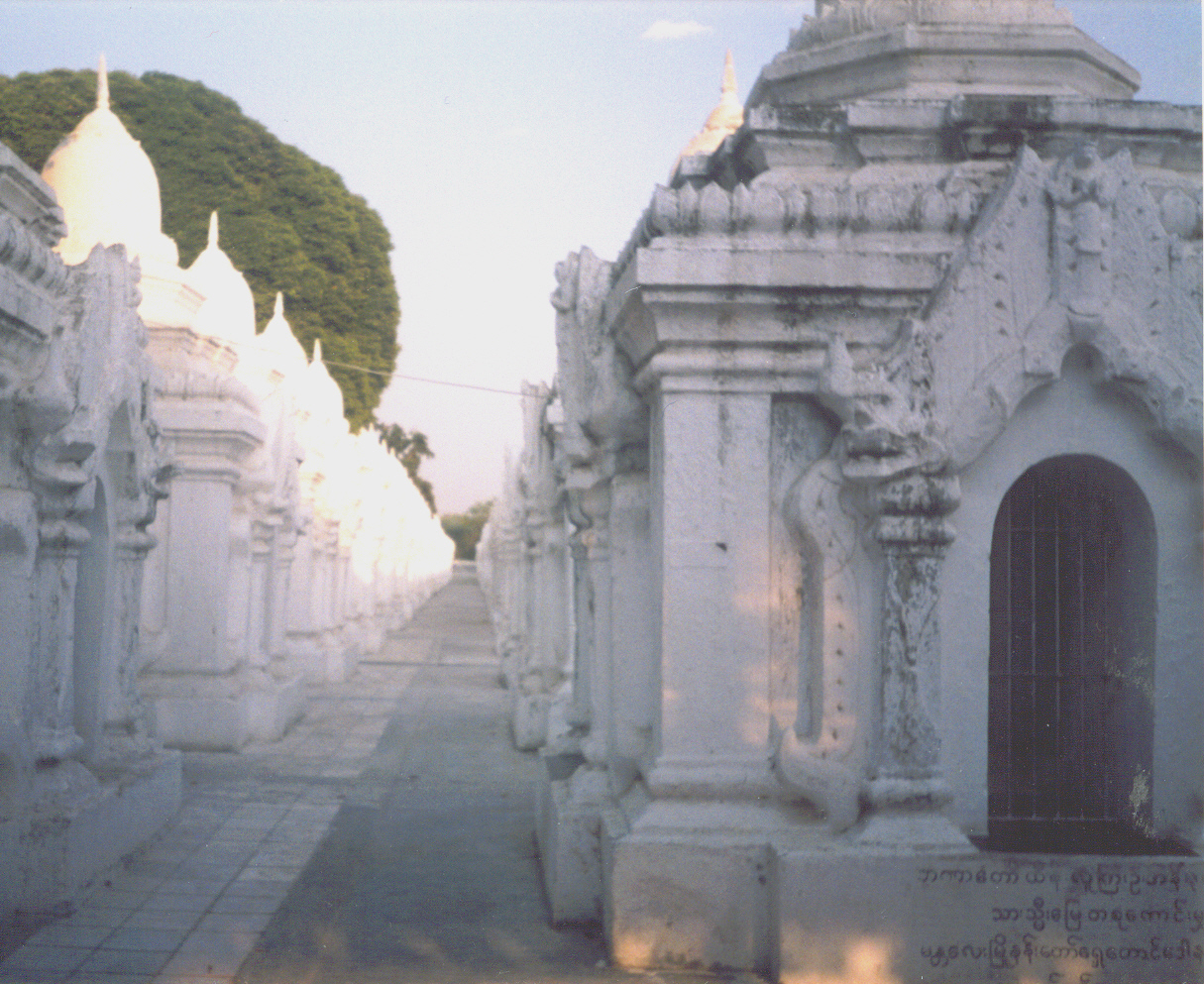 Каменная трипитакаТекст трипитаки, запечатлённый на камне в Мандалае